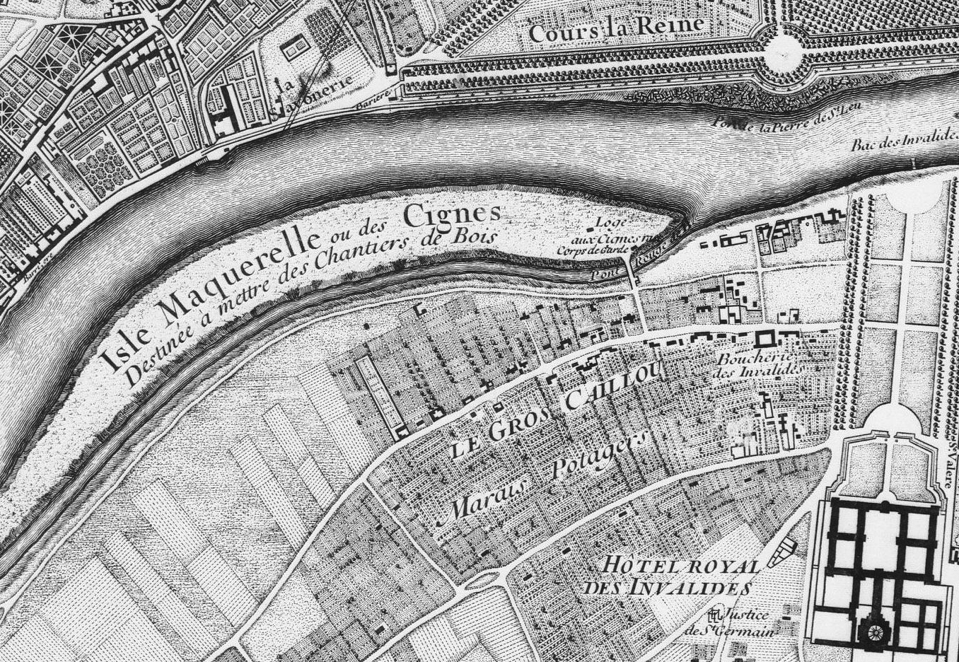 Detail of map « Paris, ses fauxbourgs et ses environs où setrouve le détail des villages, châteaux, grands chemins pavez et autres, des hauteurs, bois, vignes, terres et prez, levez géométriquement »